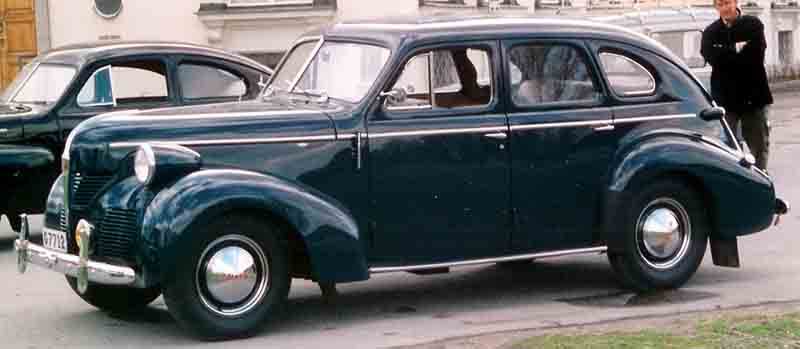 Volvo PV60 4-Door Sedan Taxi 1946